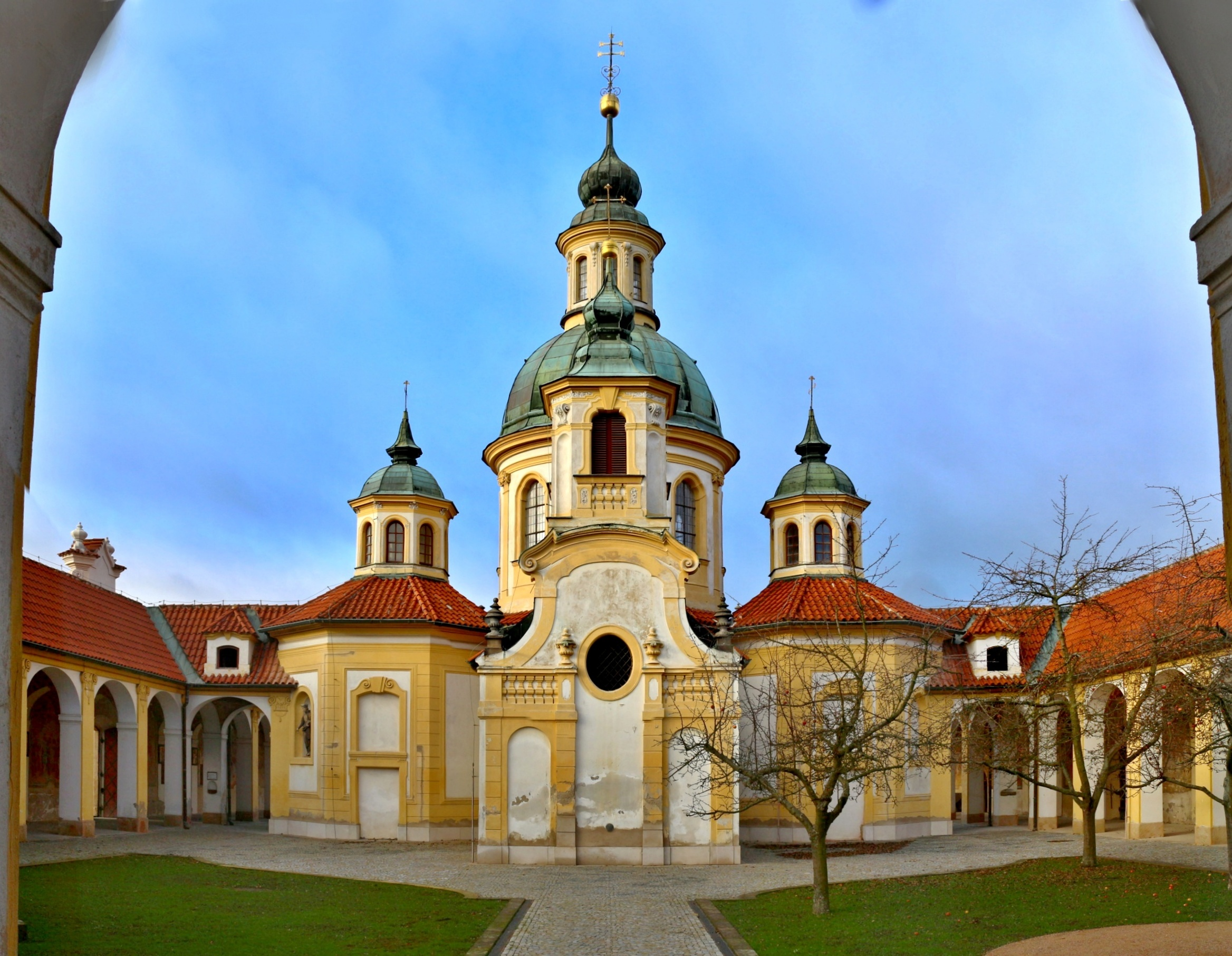 Kostel Panny Marie Vítězné na Bílé Hoře